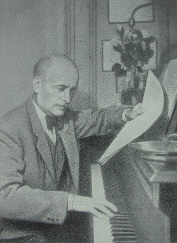 композитор Жак Ибер